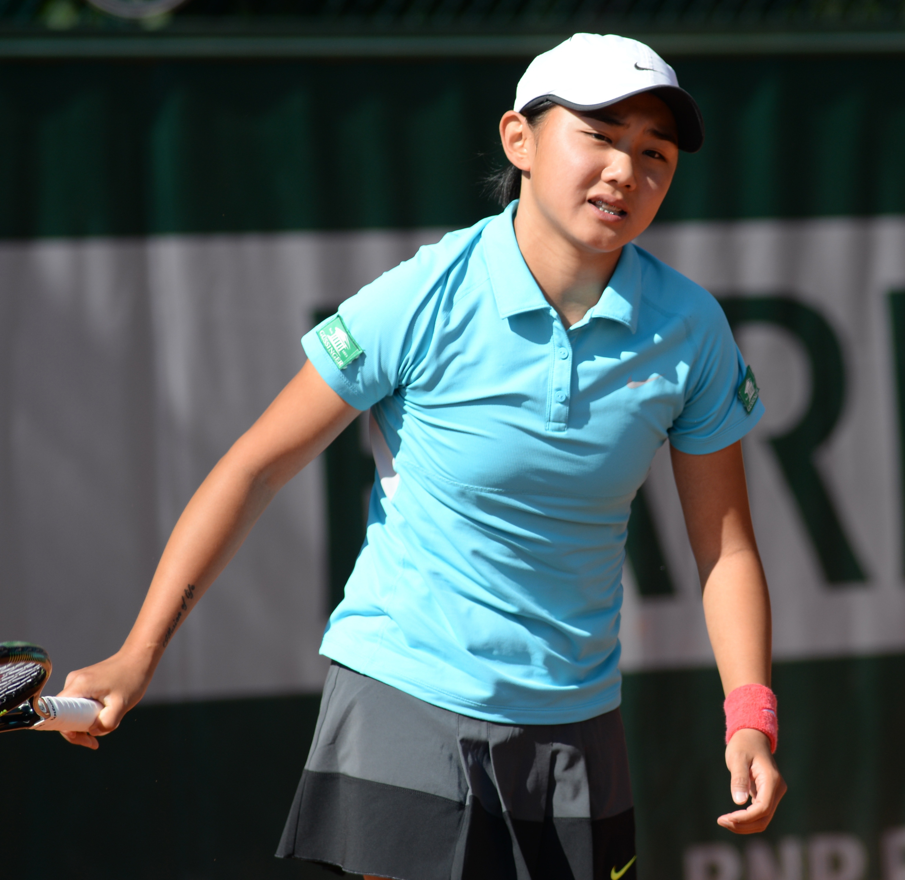 Viktoria Kan1=